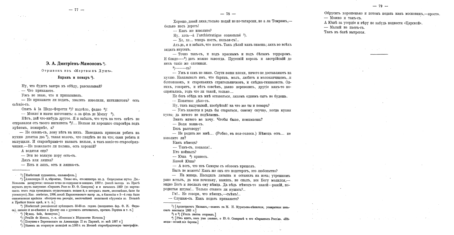 Фельетон Э. А. Дмитриева-Мамонова "Барин и повар". "Новые пропилеи", № 1, 1923